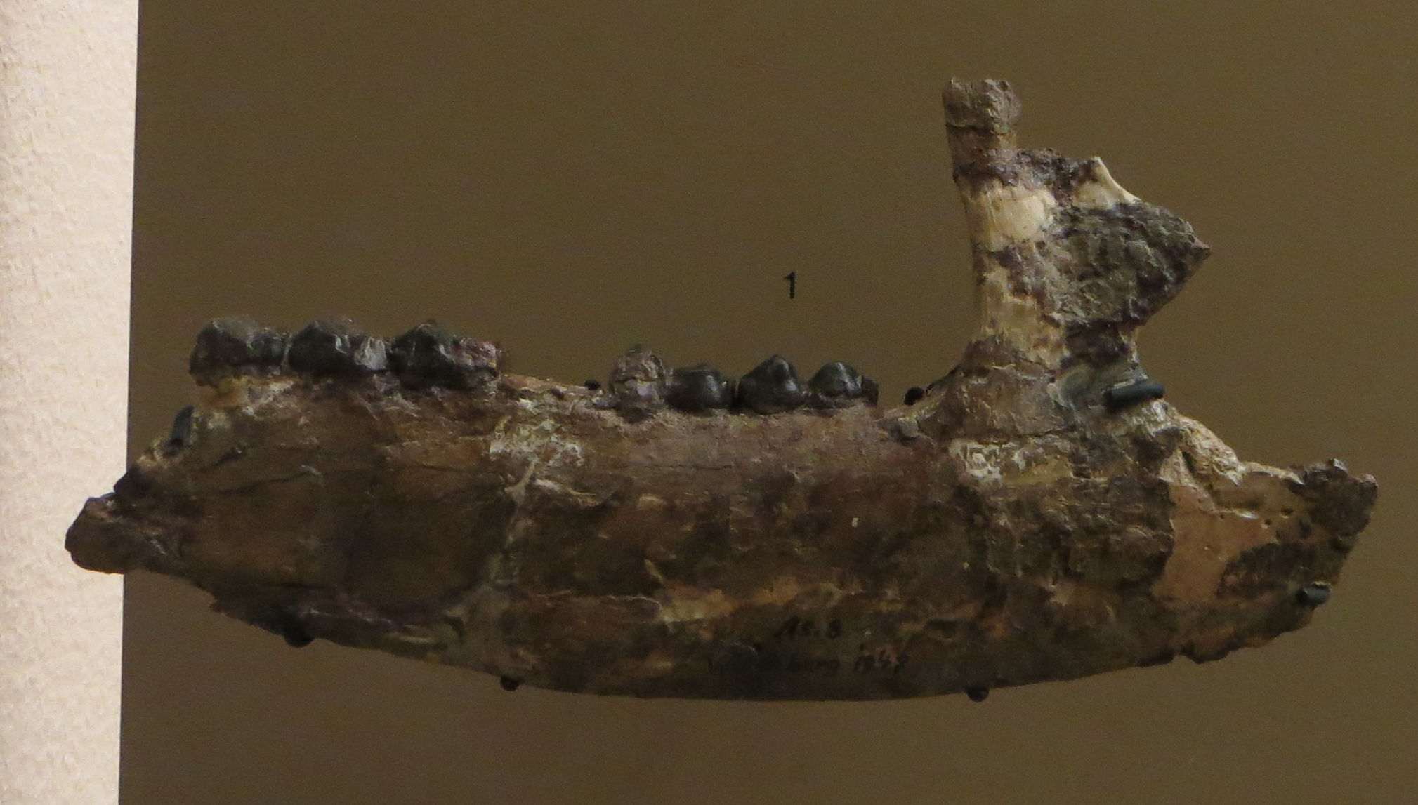 Fossil of Tapirus- Took the picture at Natural History Museum, Basel